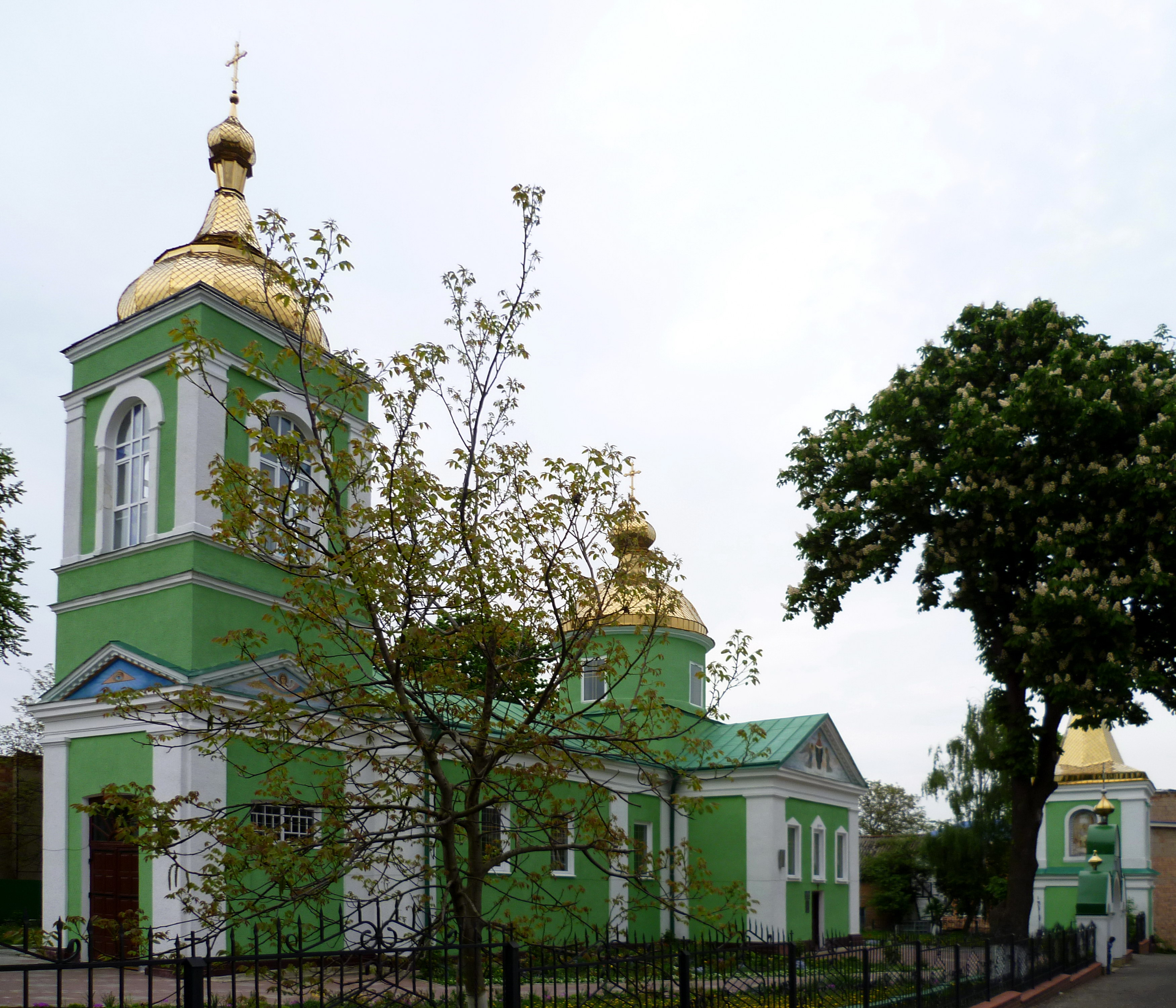 Комплекс церкви Вознесіння Господнього (1844 рік) - м.Горохів (вул. Гетьманська, 9а) Волинська область Україна